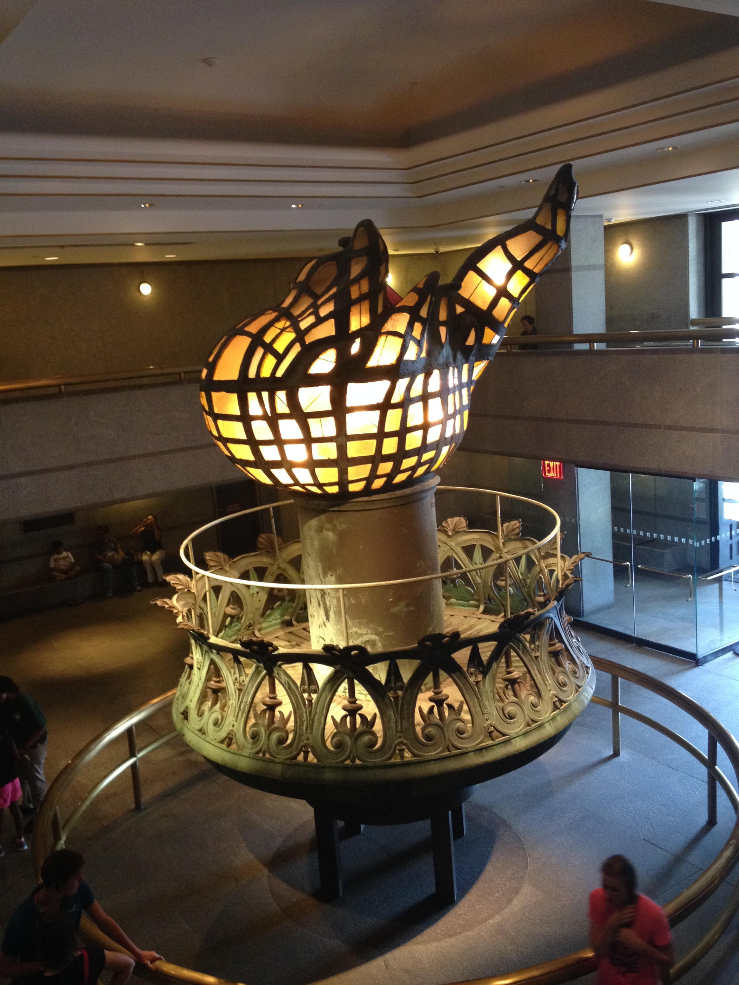 La vecchia torcia della Statua della Libertà situata all'ingresso del basamento che porta al museo e al piedistallo. La torcia originale venne sostituita con l'attuale nel 1985 , in occasione del 100 anniversario del monumento.